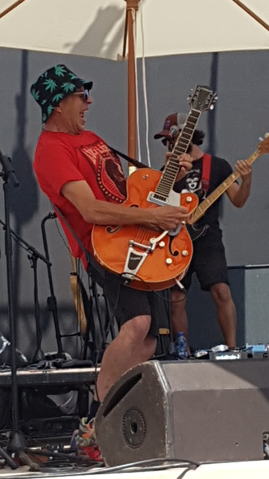 Rami Fortis